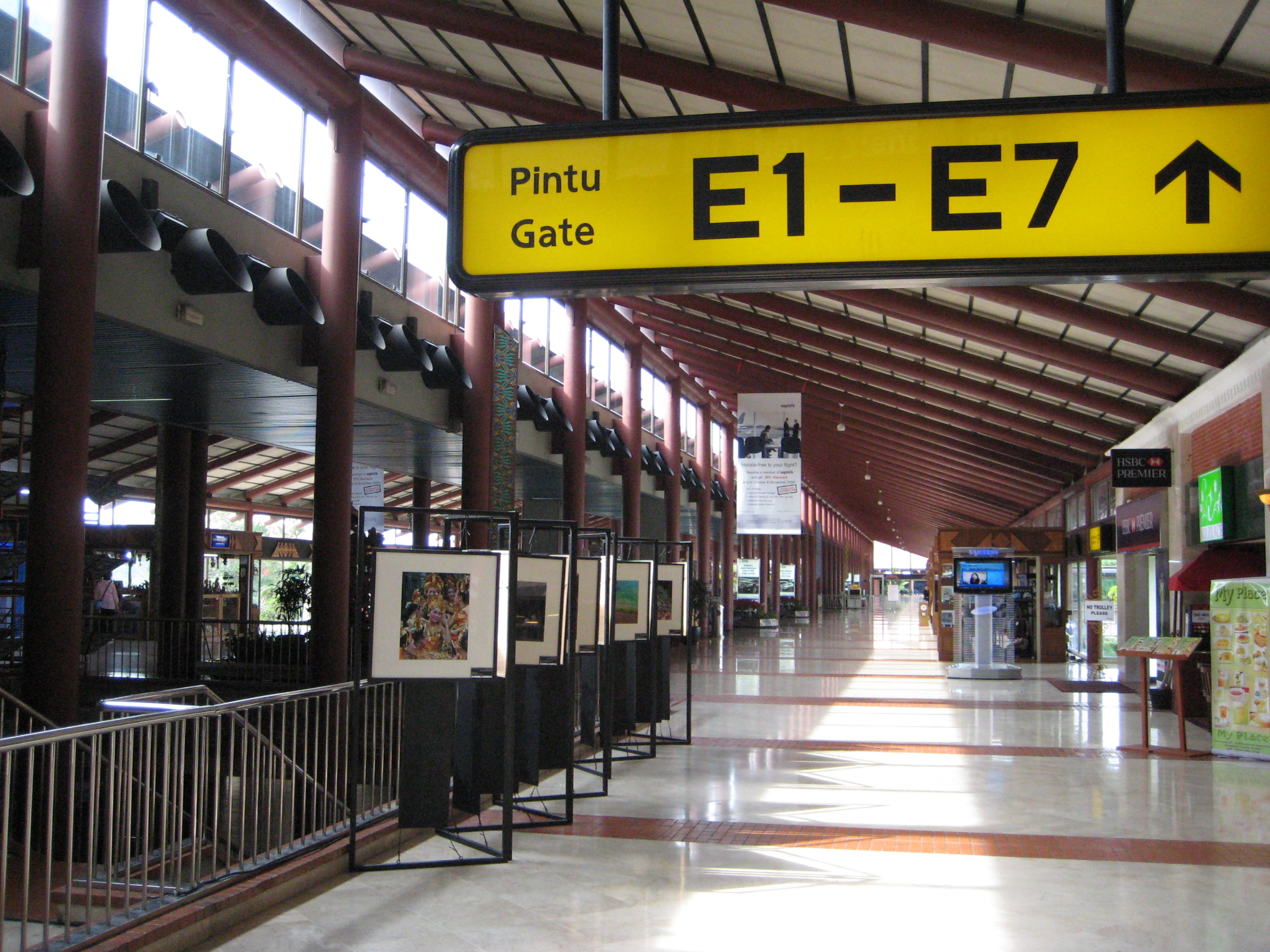 Jakarta International Airport Soekarno-Hatta, terminal 2, departure hall